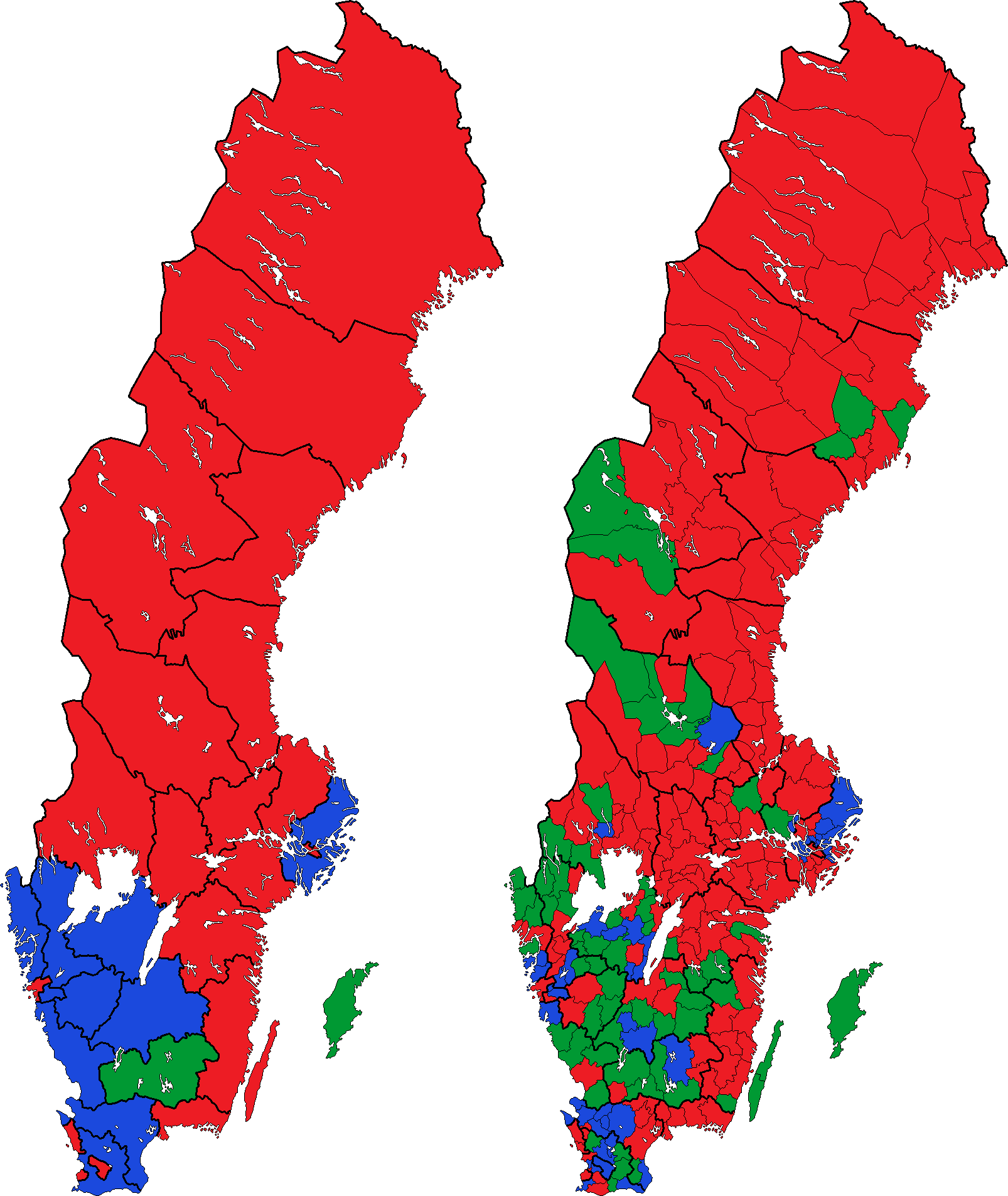 Största parti inom det ledande blocket i samtliga valkretsar och kommuner i riksdagsvalet 1982. Moderata samlingspartiet, Folkpartiet och Centerpartiet har räknats till det borgerliga blocket medan Arbetarpartiet-Socialdemokraterna och Vänsterpartiet kommunisterna har räknats till det socialistiska blocket. Partier därutöver räknas som egna block. Socialdemokraterna Moderaterna Centerpartiet